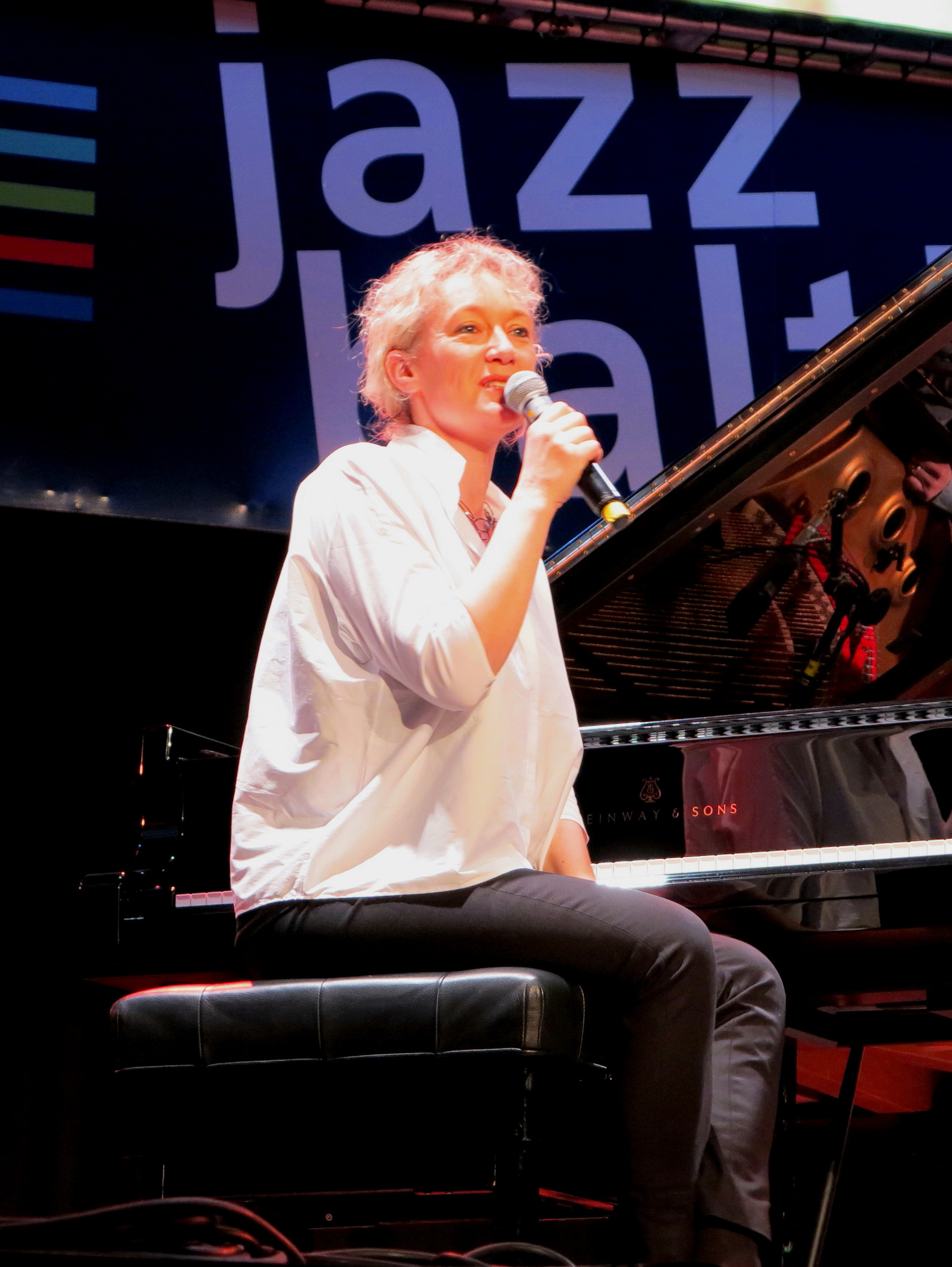 Julia Hülsmann, deutsche Jazz-Pianistin, bei ihrem Konzert bei JazzBaltica 2014 in Timmendorf/Niendorf